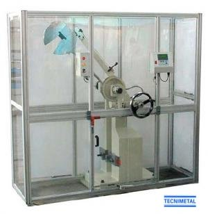 Pendulo de Charpy